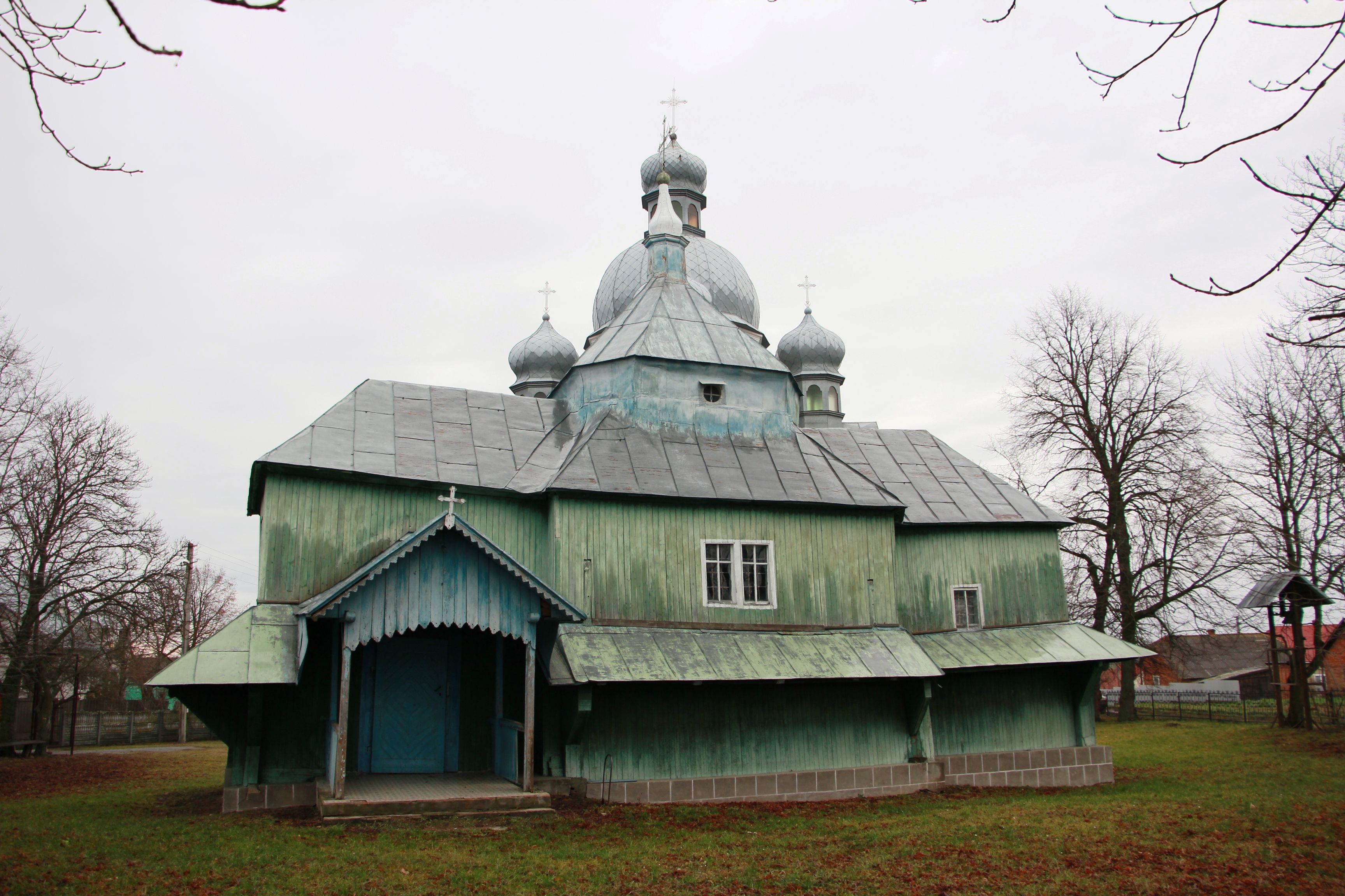 Церква Покрови Пресвятої Богородиці 1748